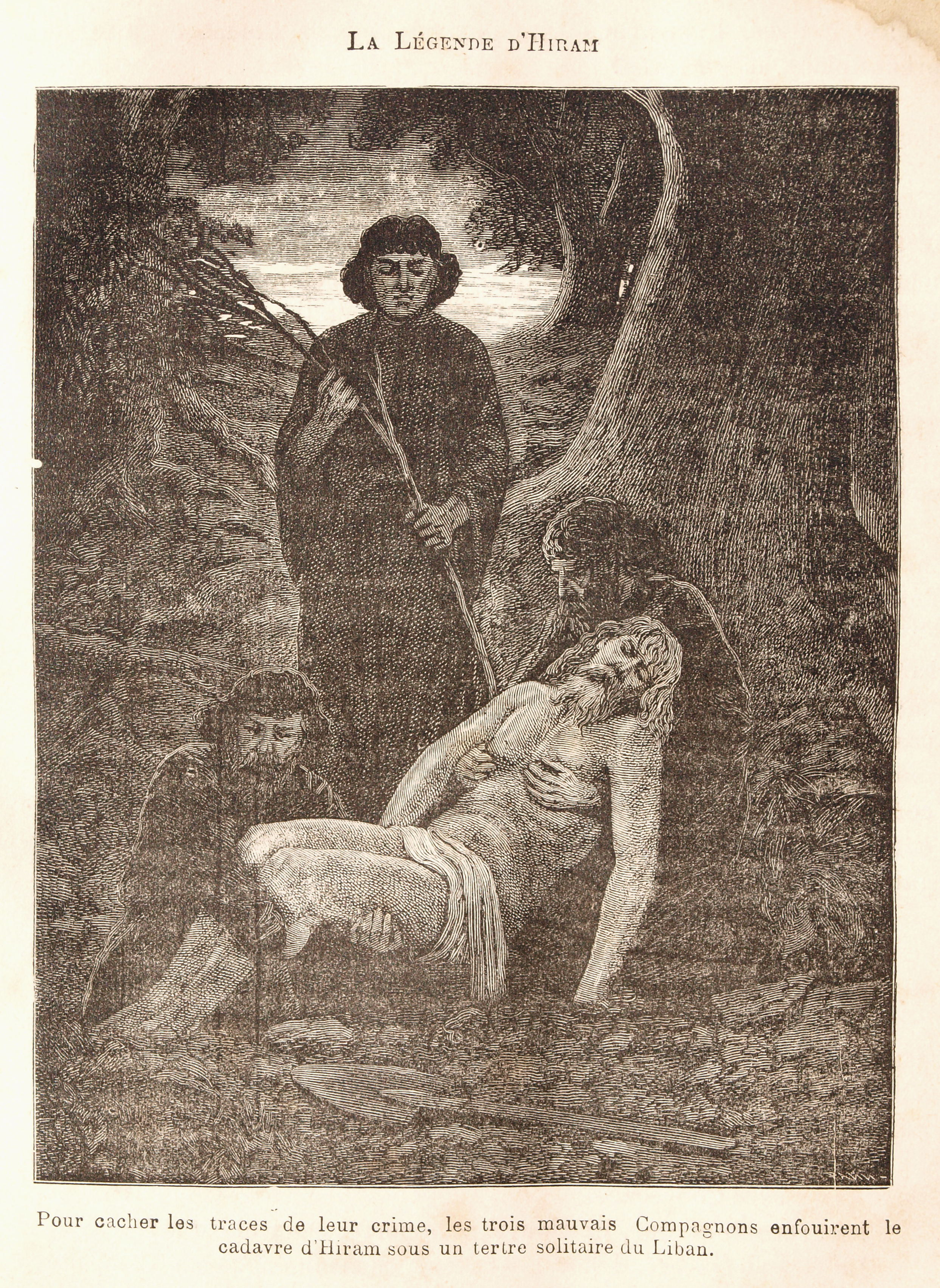 Une des gravures du document de Léo Taxil, Les Mystères de la Franc-Maçonnerie, Paris, 1886.